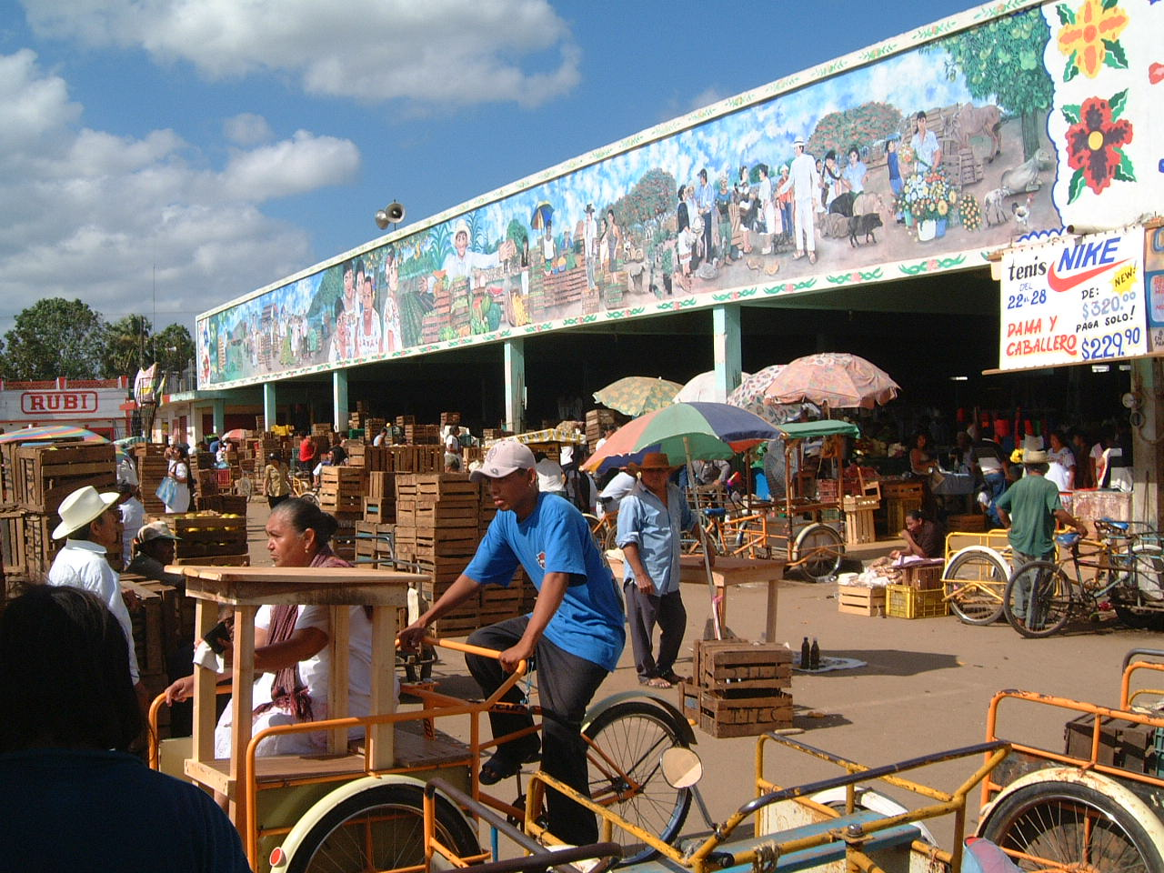 Market in Oxkutzkab Yucatan Mexico